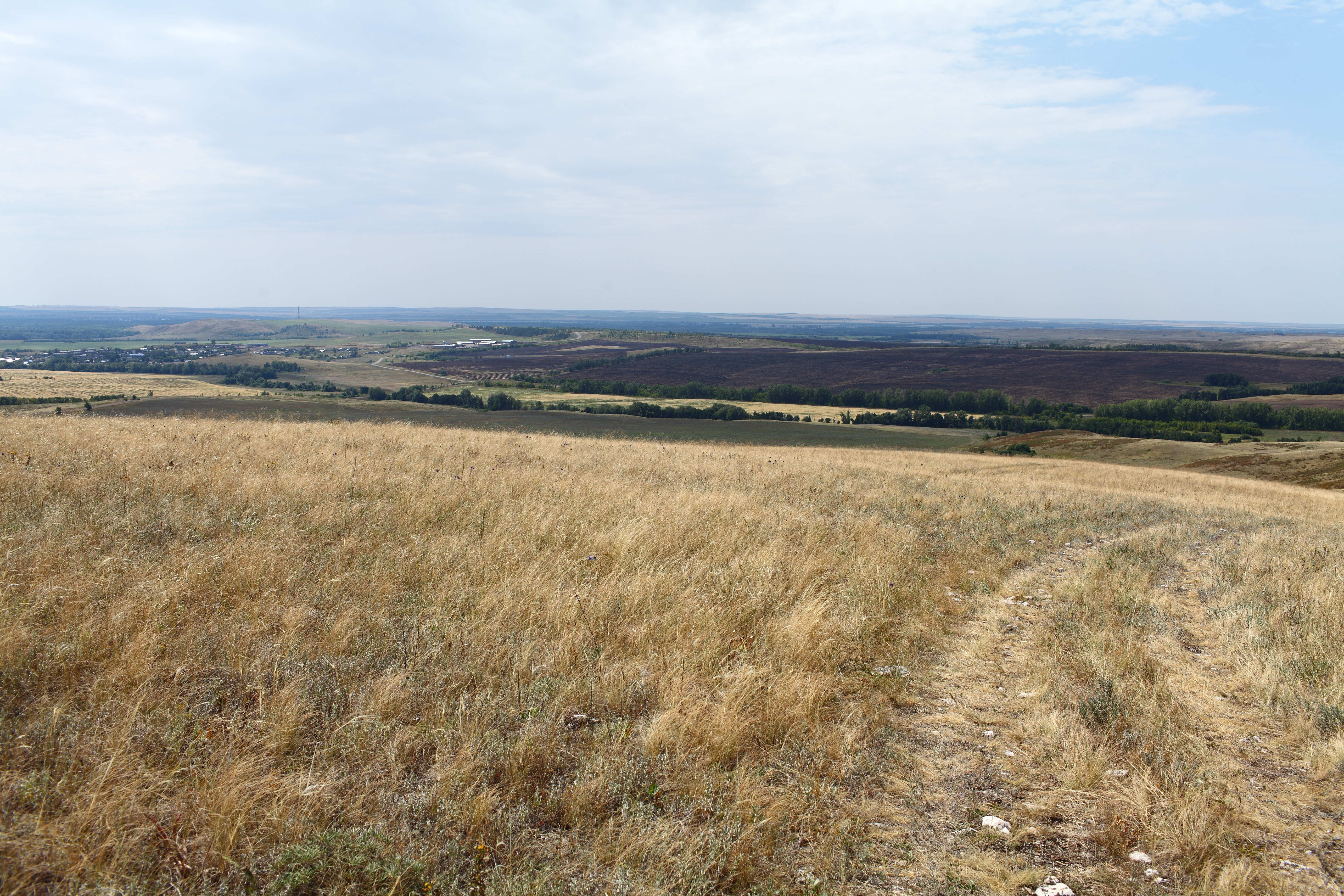 Дорога с вершины высоты 322. Вид в юго-западном направлении